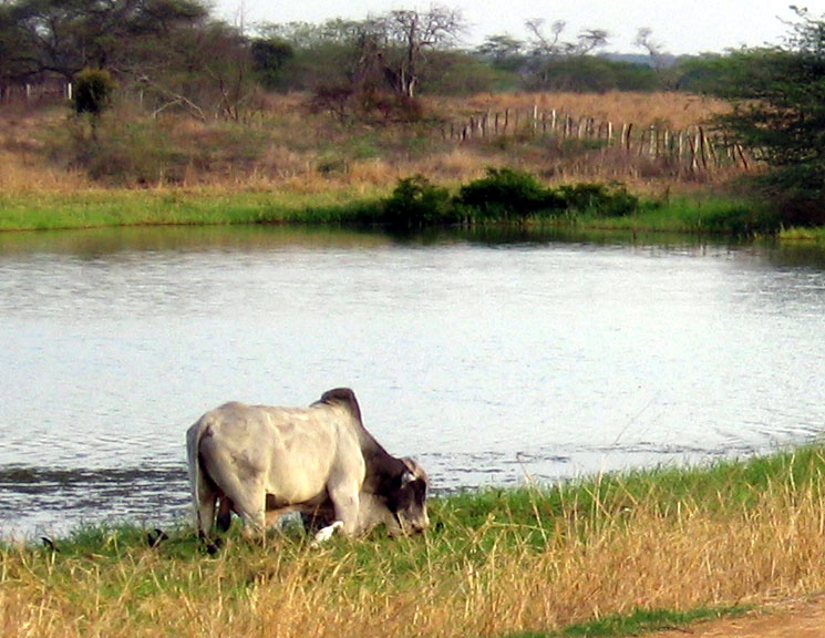 Finca (Coco de Mono-Agropecuaria El Paraiso S.A.), Aragua de Barcelona